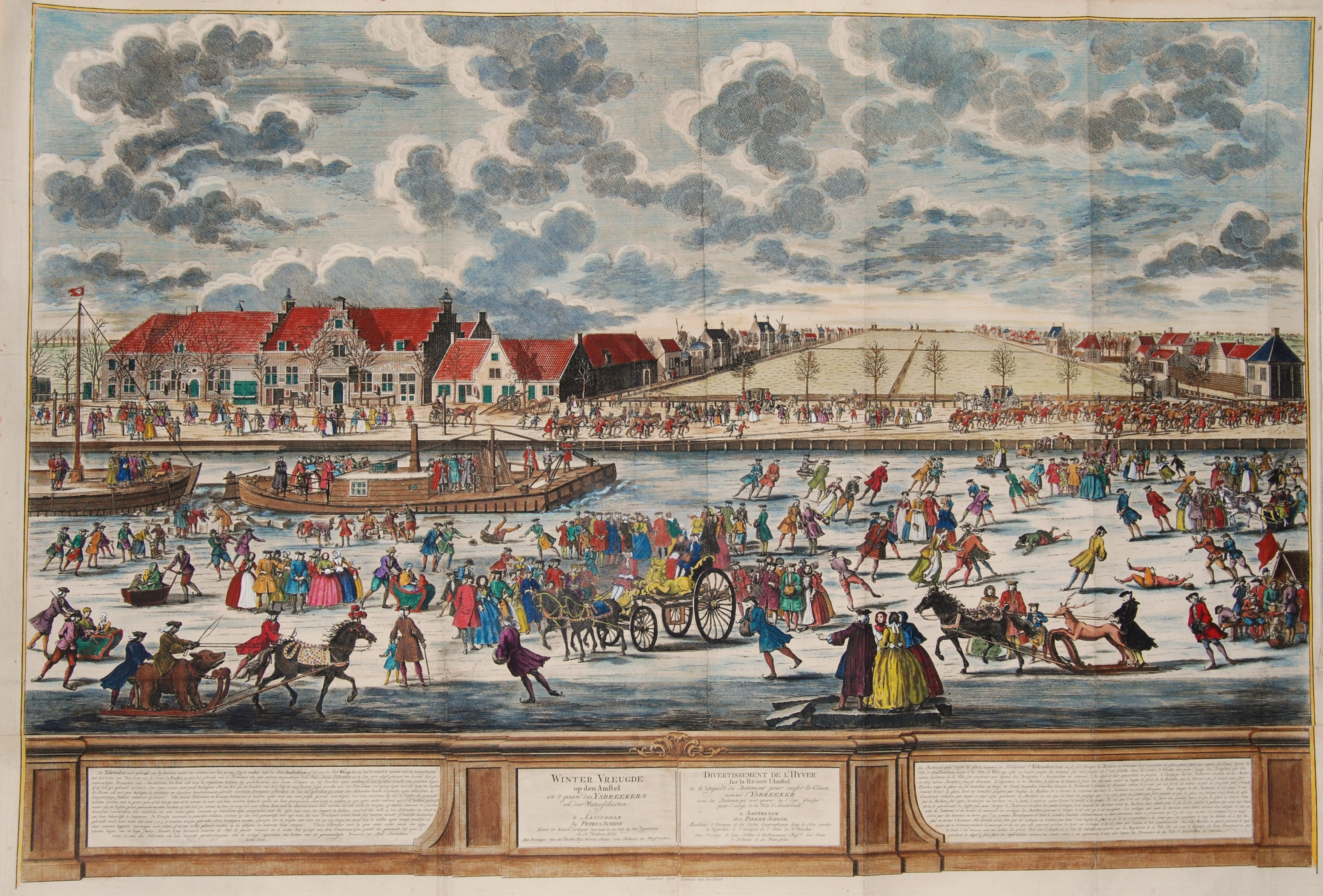 “Winter Vreugde opden Amstel en ‘t gaan der Ysbreekers en der waterschuiten ” Ets naar een tekening van Tileman van der Horst. Gedrukt van verschillende koperen platen. Uitgegeven door Pieter Schenk (1746?). Later met de hand gekleurd. Afmetingen (prent) 63 x 91 cm. Op de Amstel, gezien naar de Weesperzijde, vaart (getrokken door 40 paarden) onder veel belangstelling de IJsbreker voorbij. Menigeen heeft Friese doorlopers ondergebonden en zwiert over het ijs. Anderen zijn nog niet zo ver gevorderd en bekopen hun poging op het ijs met een val. De IJsbreker was een gezamenlijke onderneming van de Amsterdamse bierbrouwers. Het ijs moest worden opengebroken voor waterschuiten die vers water haalden uit de Vecht bij Weesp. Op die manier konden zij ook in de winter verzekerd zijn van een regelmatige aanvoer. De IJsbreker werd bevaren door “eenen Schipper en vijf Knechts”. Het in 1696 gebouwde schip is nog tot 1860 beschikbaar gebleven voor de watervoorziening. Op de afgebeelde plek aan de Amstel staat tegenwoordig Muziekcentrum De IJsbreker.